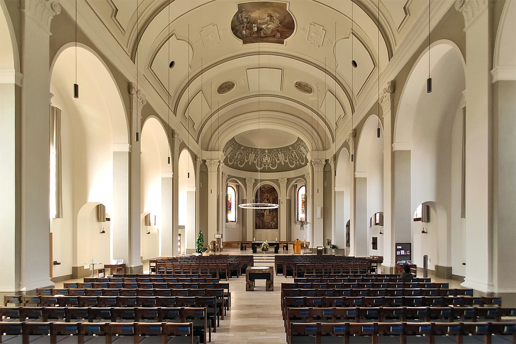 Zürich Wipkingen, Pfarrkirche Guthirt